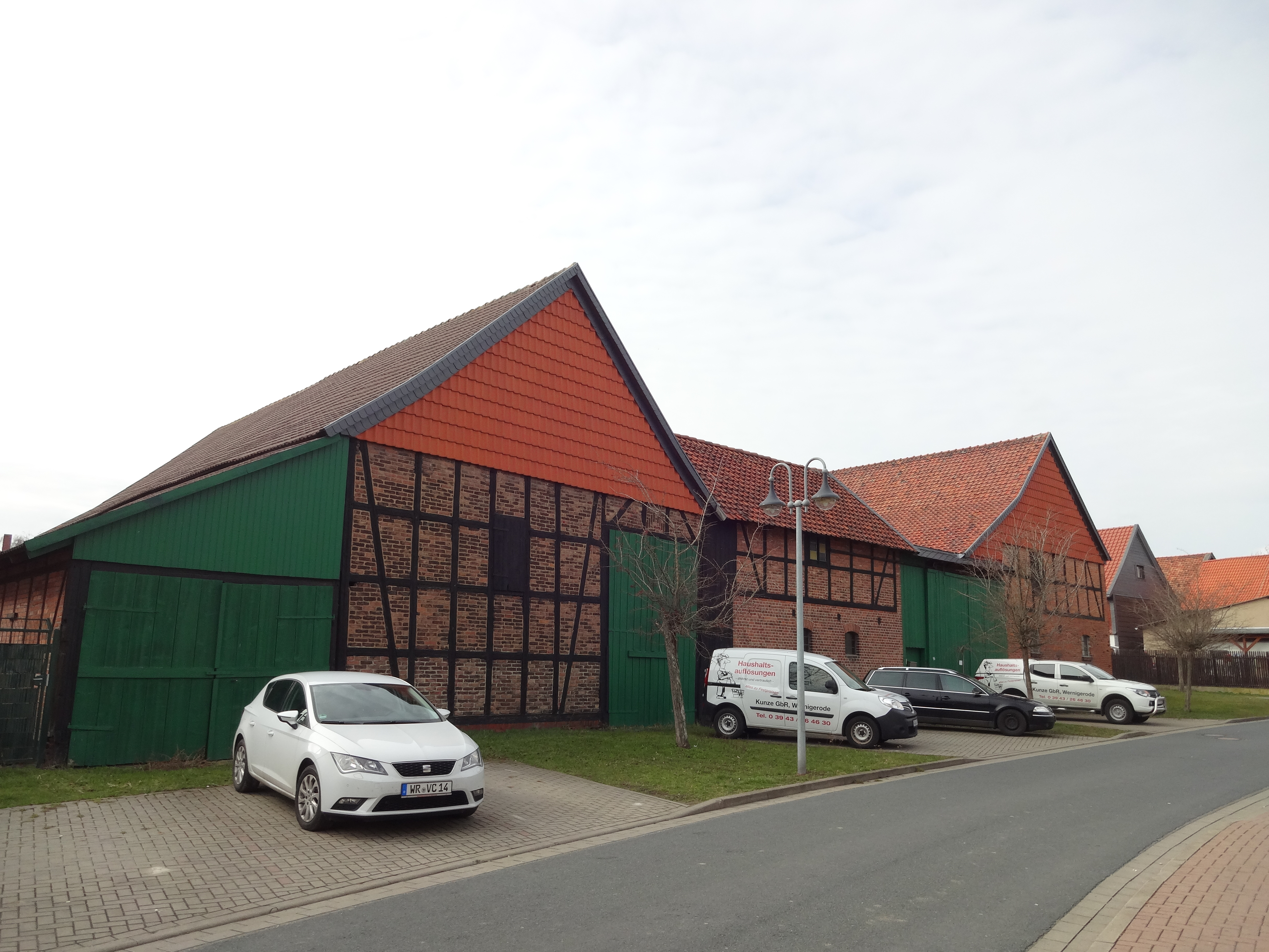 denkmalgeschütztes Bauernhaus in der Halben Straße 14 in Reddeber, Ortsteil von Wernigerode